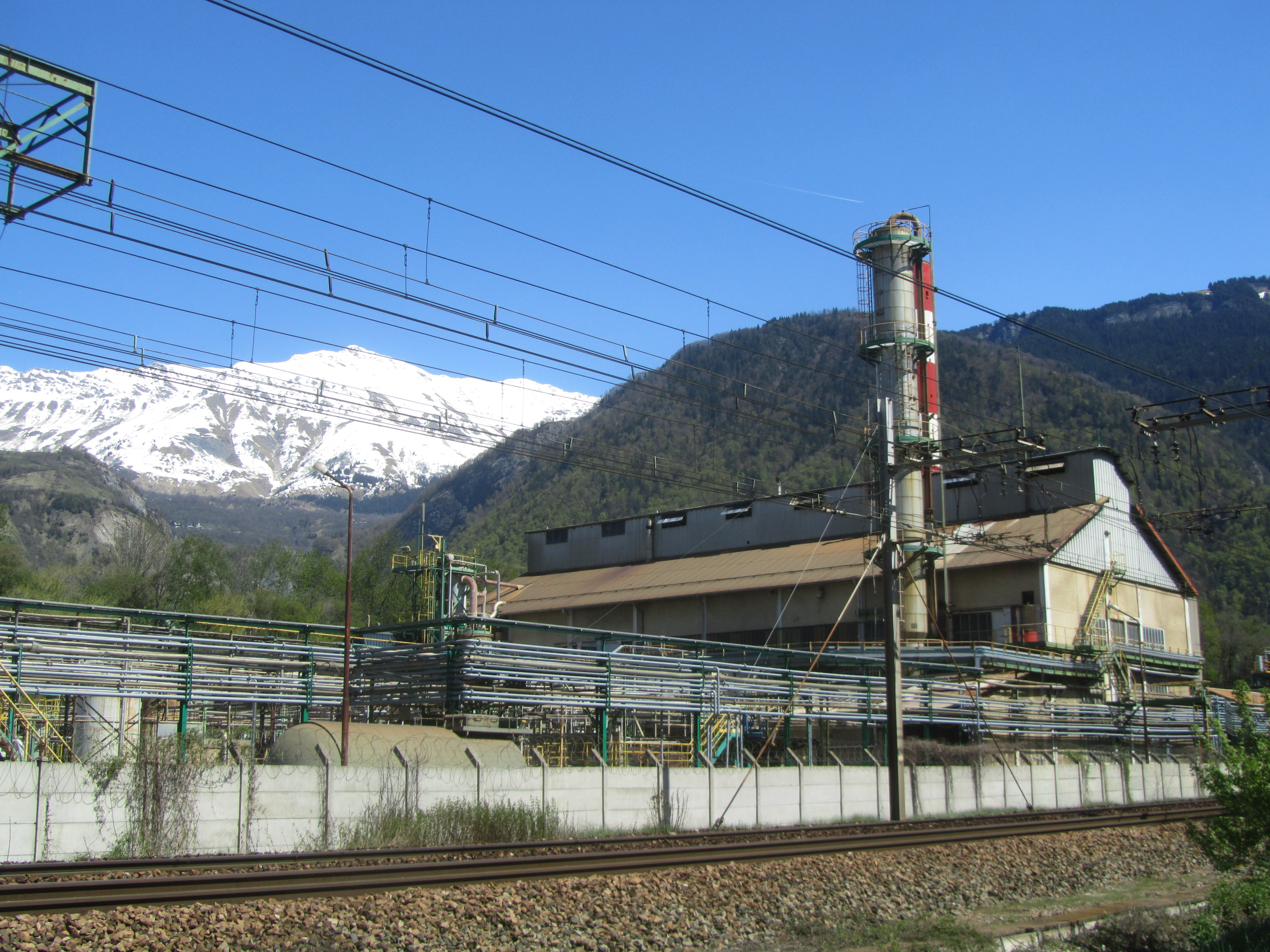 L'usine Arkema de la Chambre, qui présente le seul exemple en Maurienne de reconversion de la carbochimie à la pétrochimie.